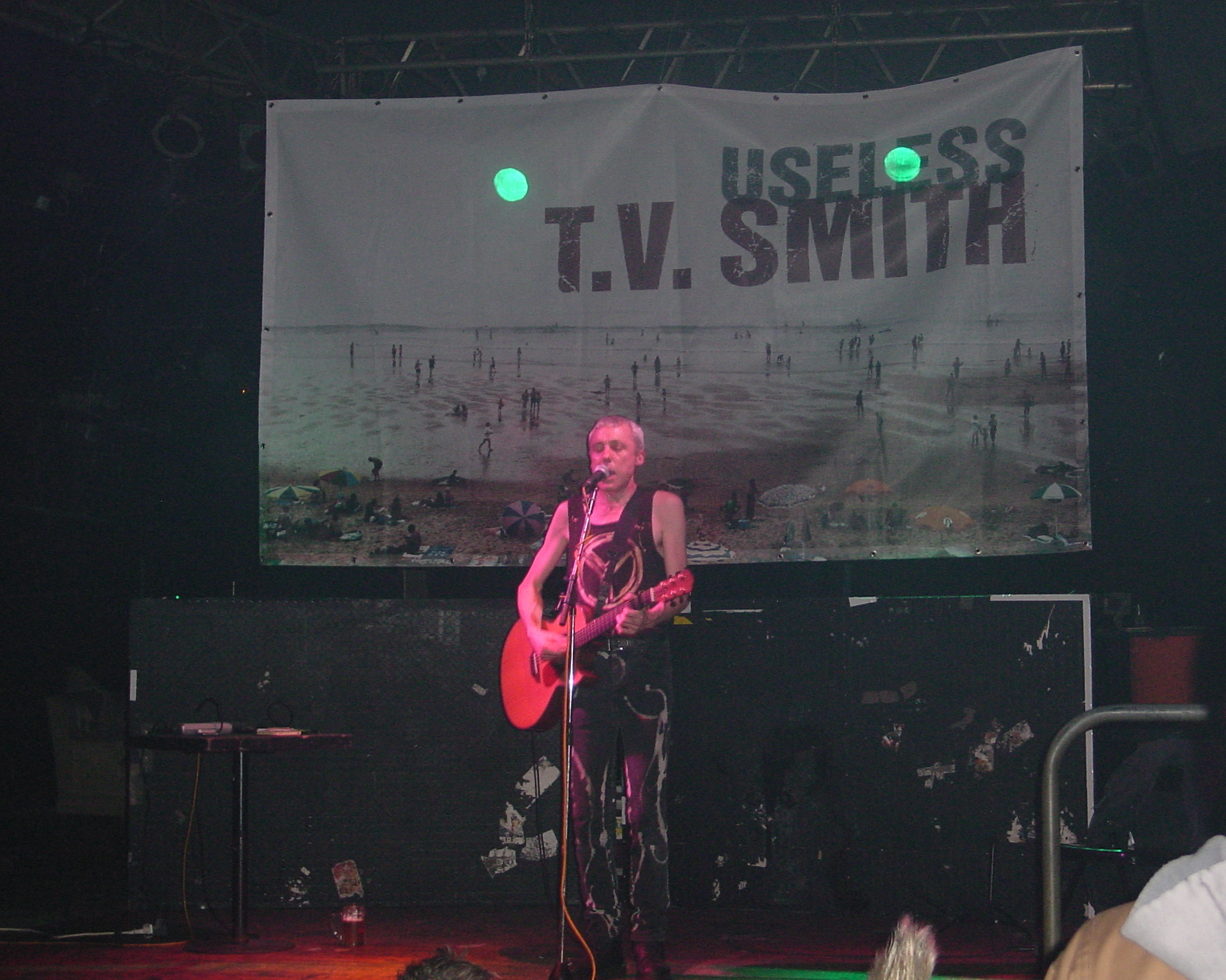 T. V. Smith, Stuttgart, Röhre